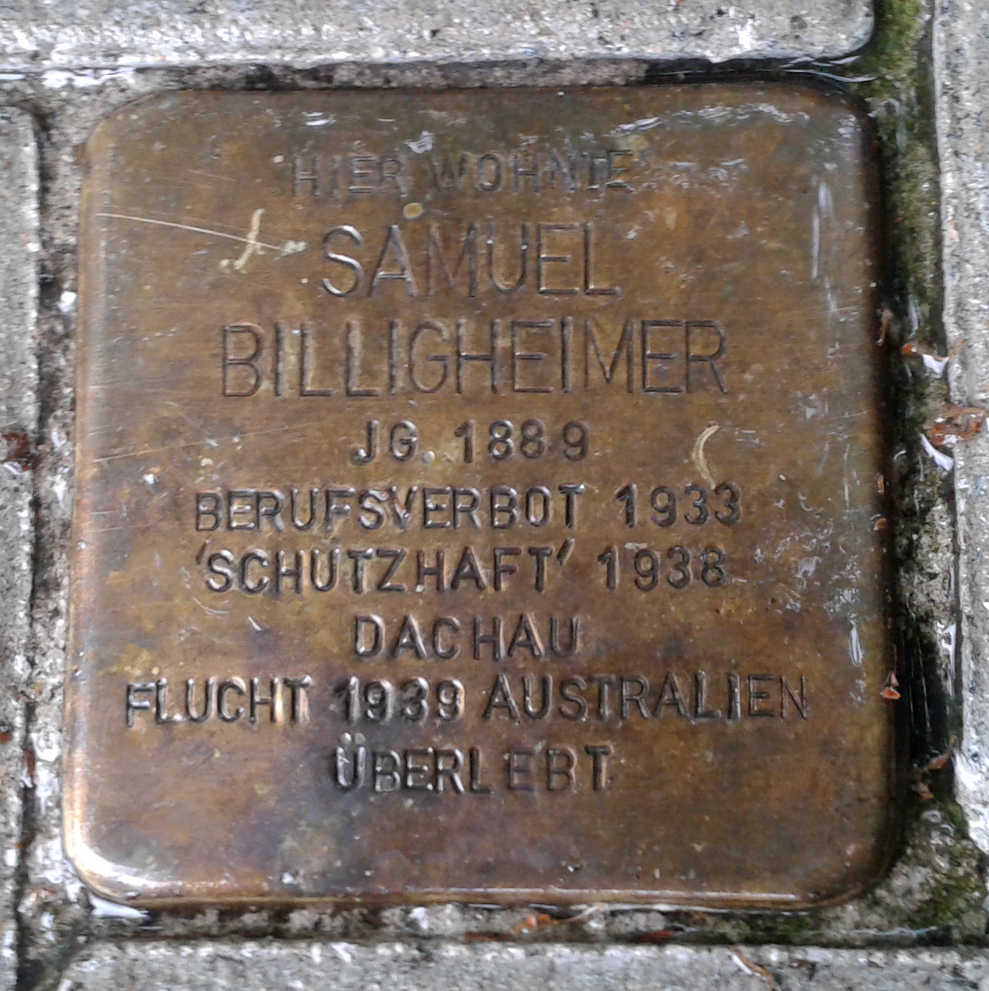 Stolperstein in Mannheim, Rathenaustr. 1